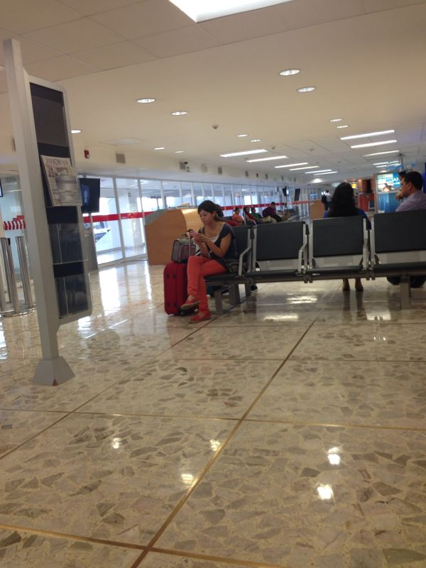 Sala de última espera del aeropuerto de Acapulco